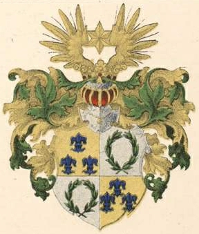 Sege von Laurenbergi suguvõsa aadlivapp